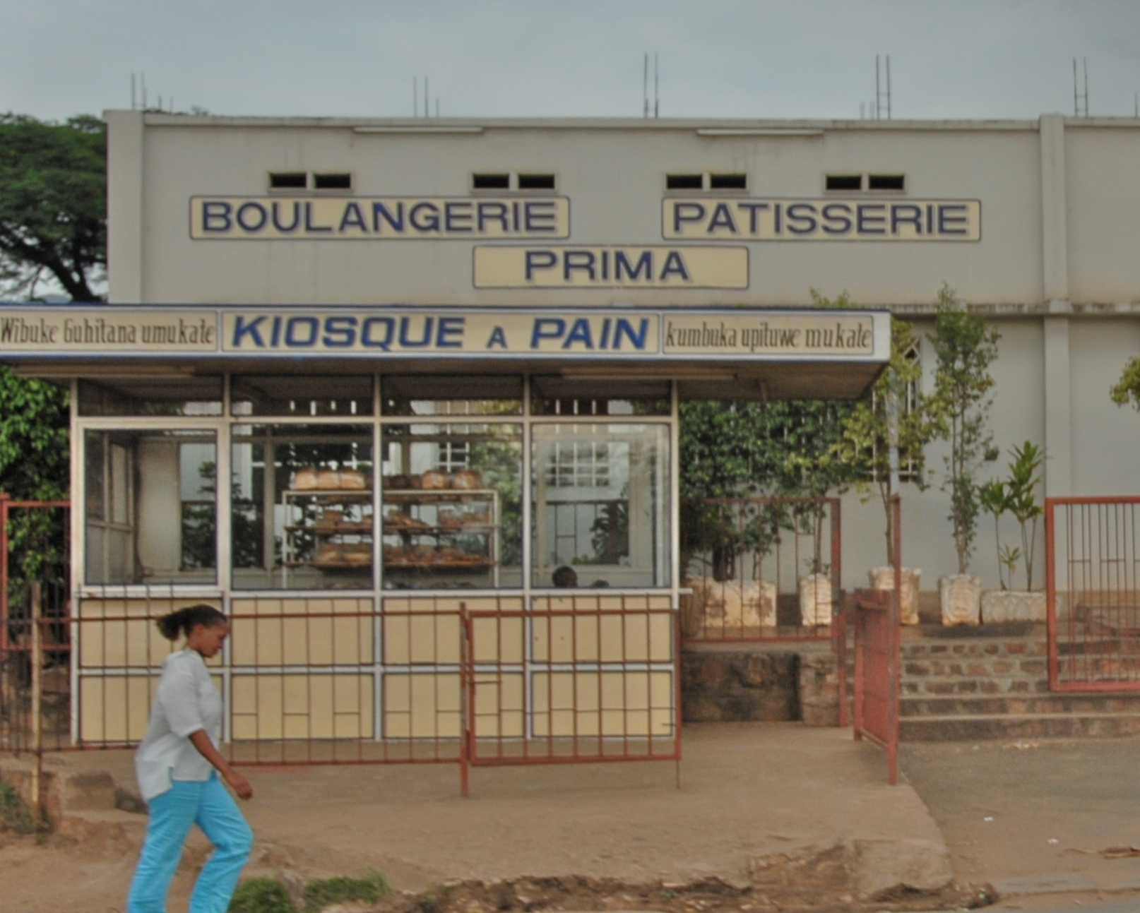 Bujumbura